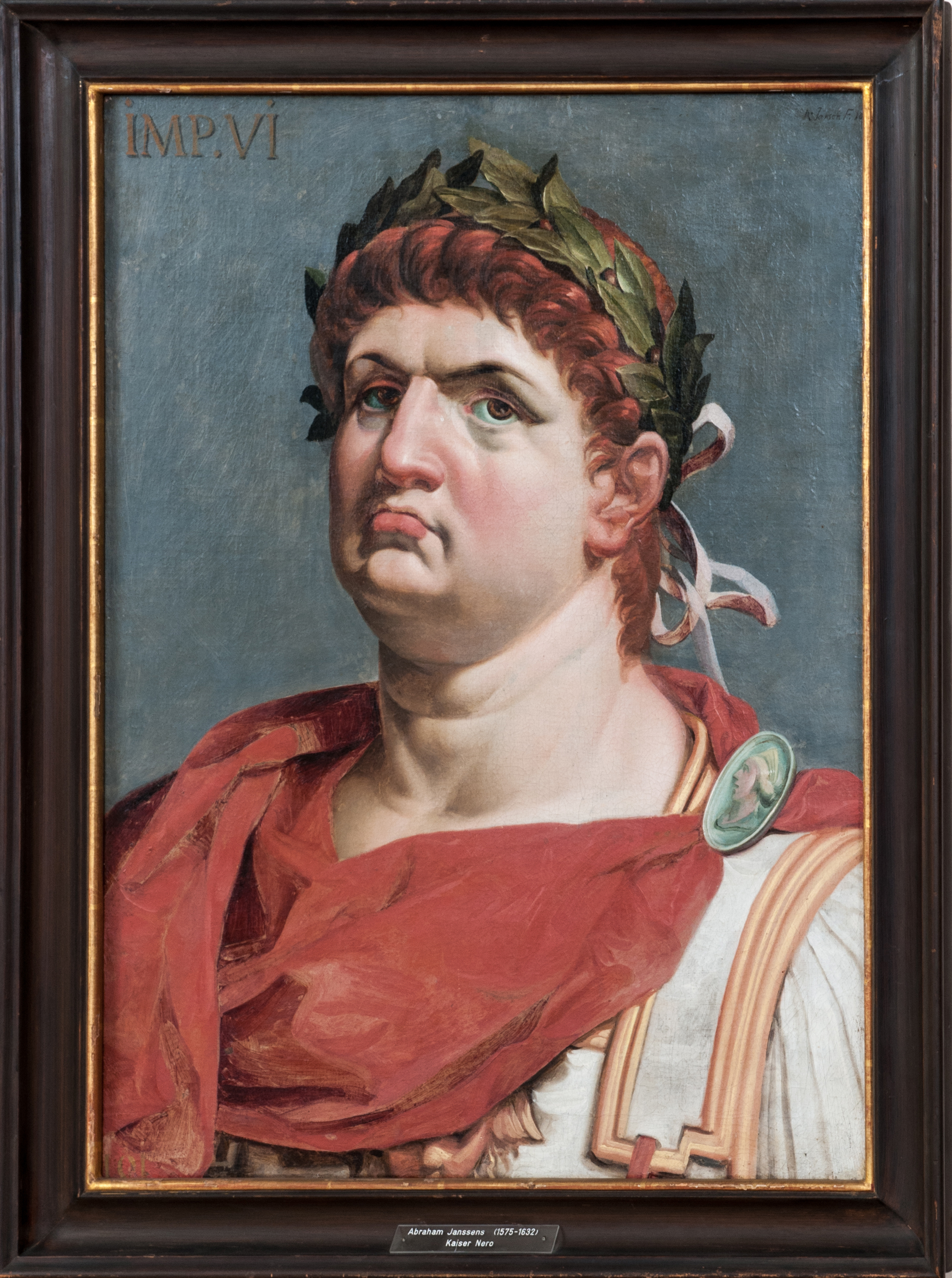 Teil einer Serie römischer Kaiserporträts niederländischer und flämischer Maler